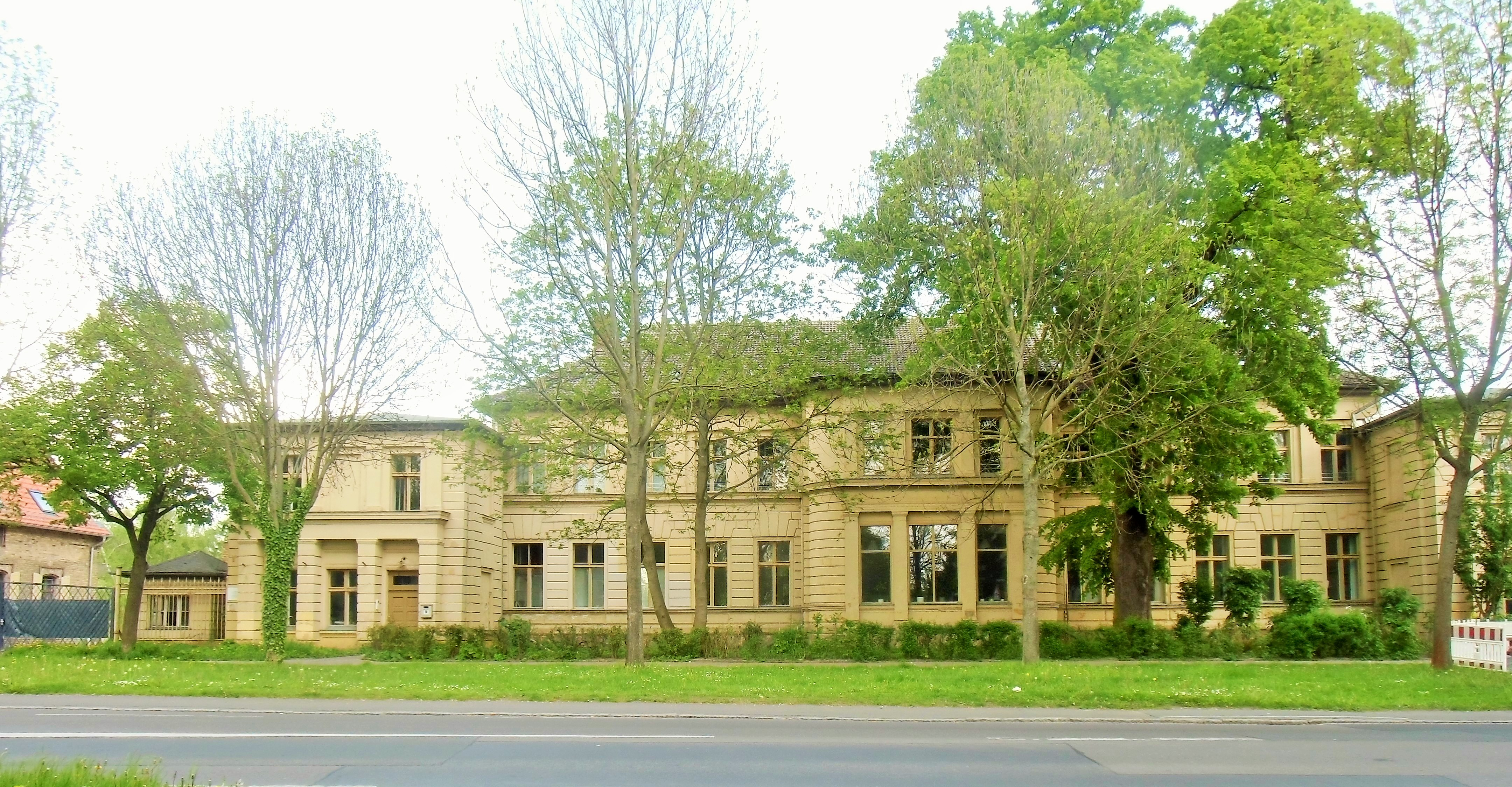 Denkmalgeschütztes Herrenhaus des Gutshofes Malchow